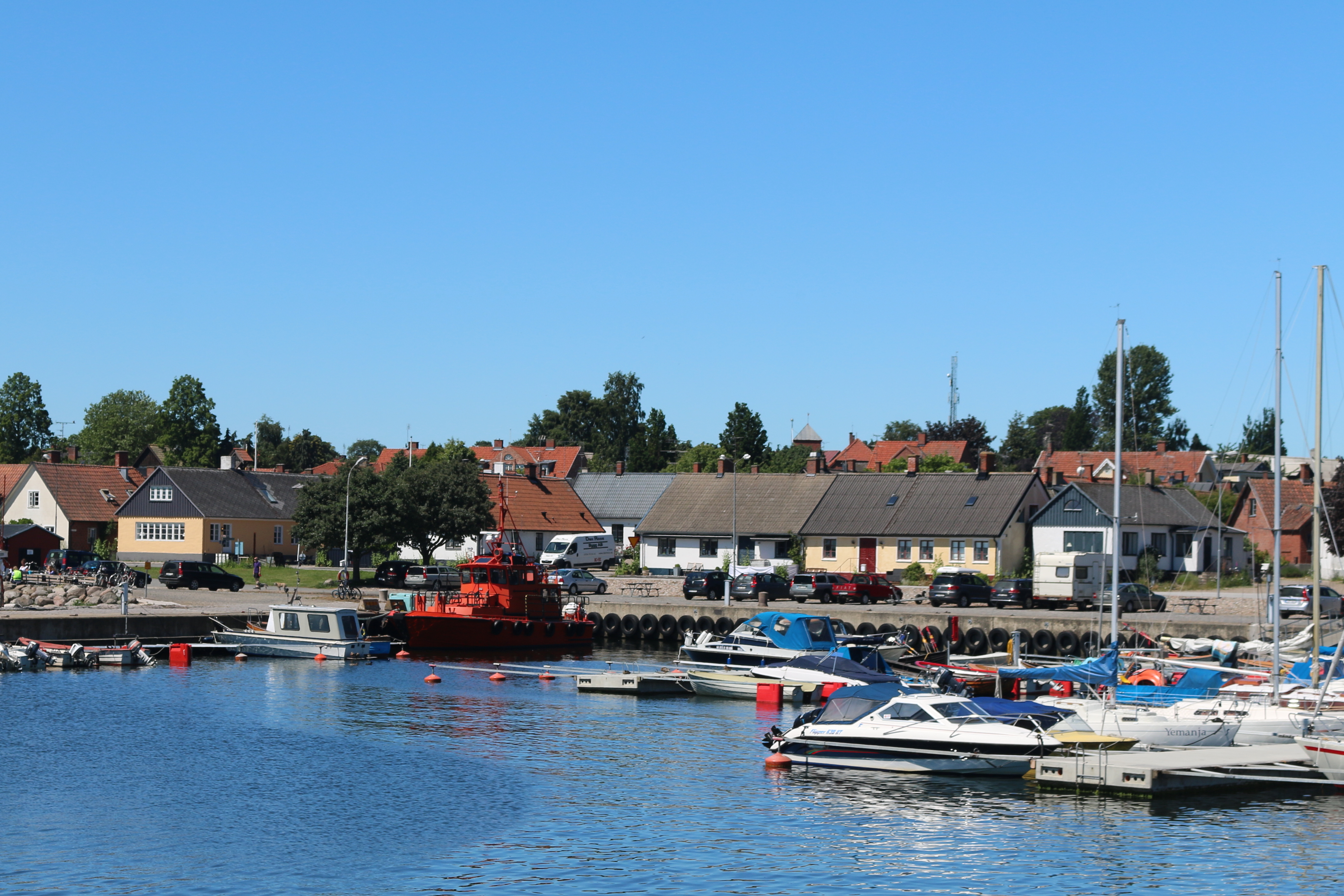 Skillinge juli 2015